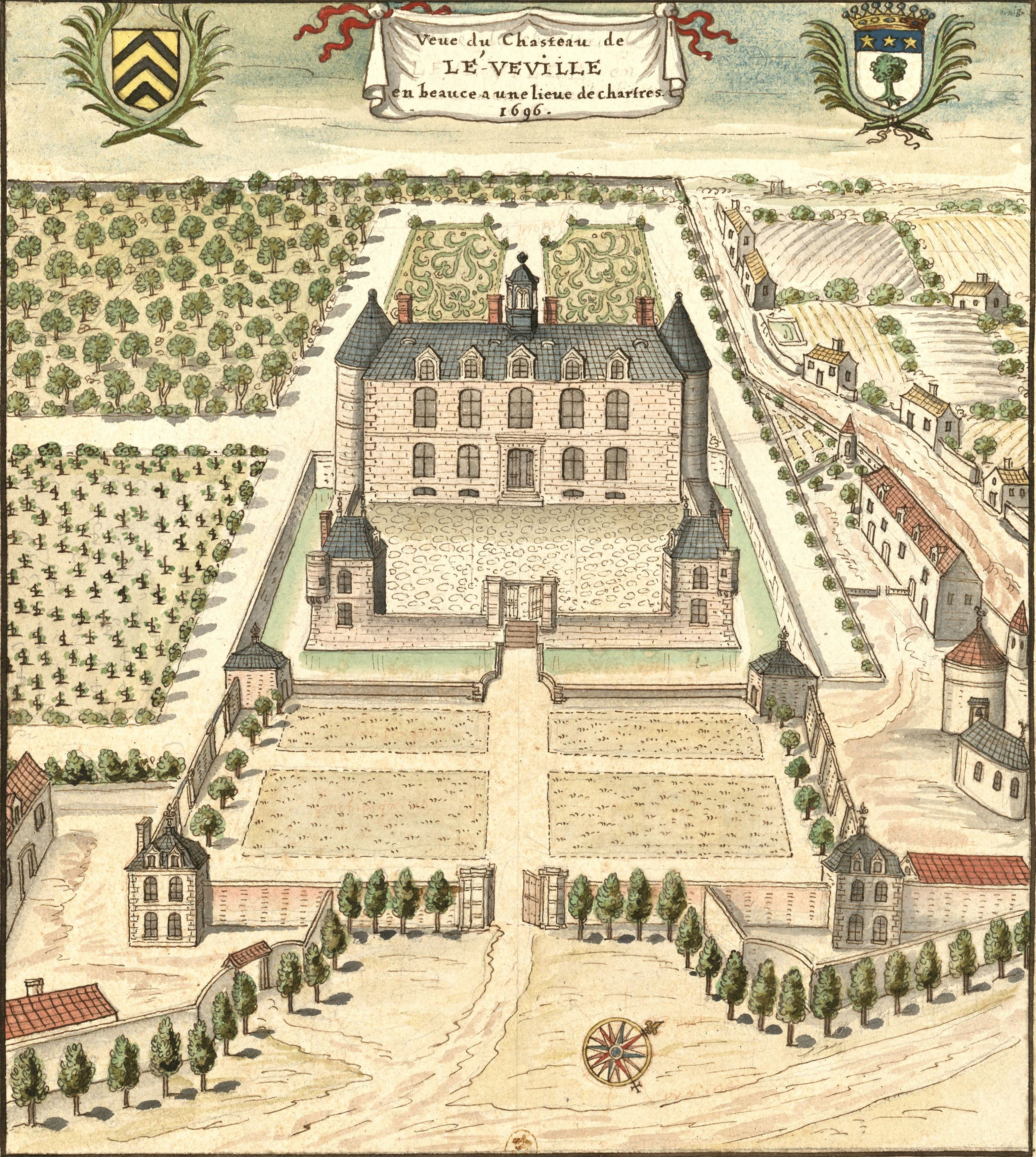 Замок Levesville в Bailleau-l’Evêque Рисунок из коллекции Геньера (Gaignières) 1696 год (Национальная библиотека, зал гравюр)